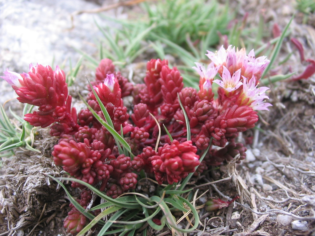 Pablo Alberto Salguero Quiles. Gredos. Ávila. España.